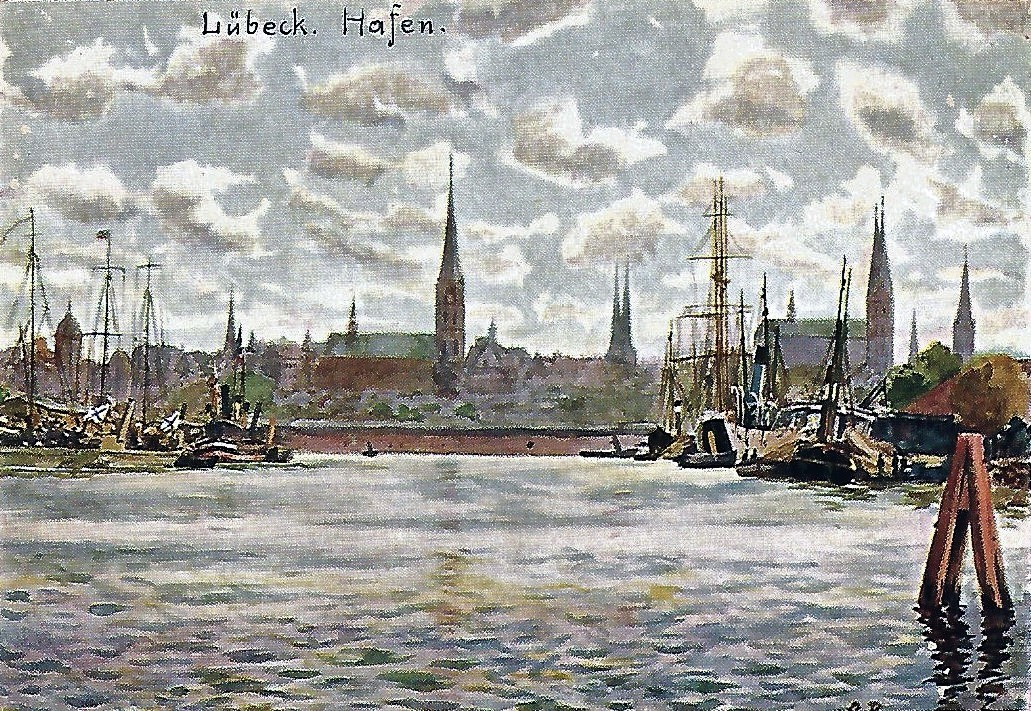 Blick auf den Hafen von Lübeck nach einem Gemälde von Elisabeth Reuter. Postkarte wurde von Johannes Nöhrings Sohn Bernhard verlegt. Unten rechts erkennt man ansatzweise die Signatur: E. Reuter